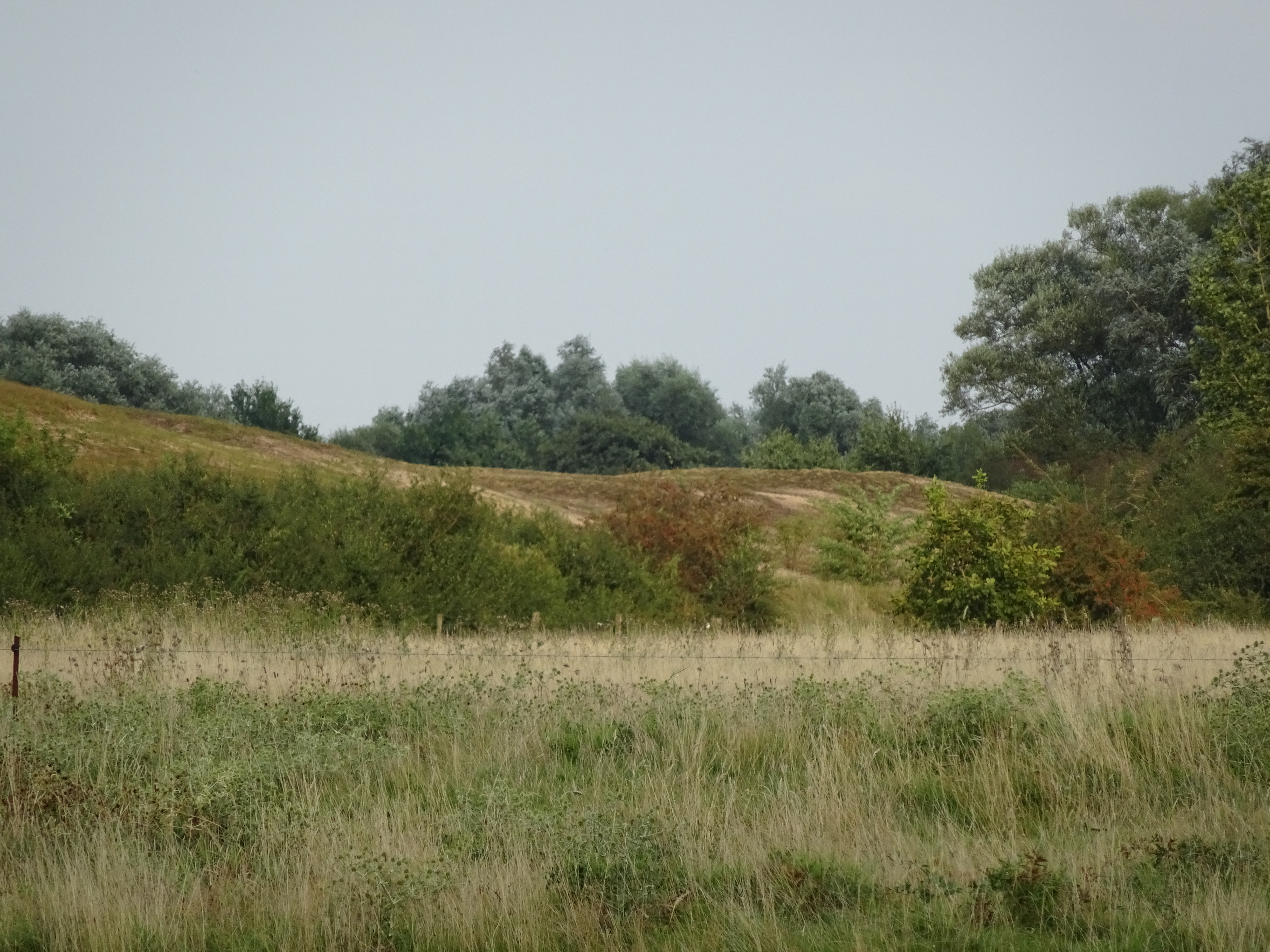 Kalkar-Wissel: Wisseler Dünen